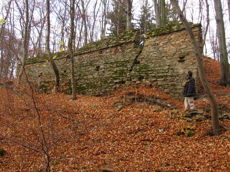 Castle - Lúčka